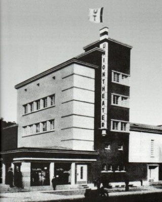 Kino Uniontheater in Erfurt